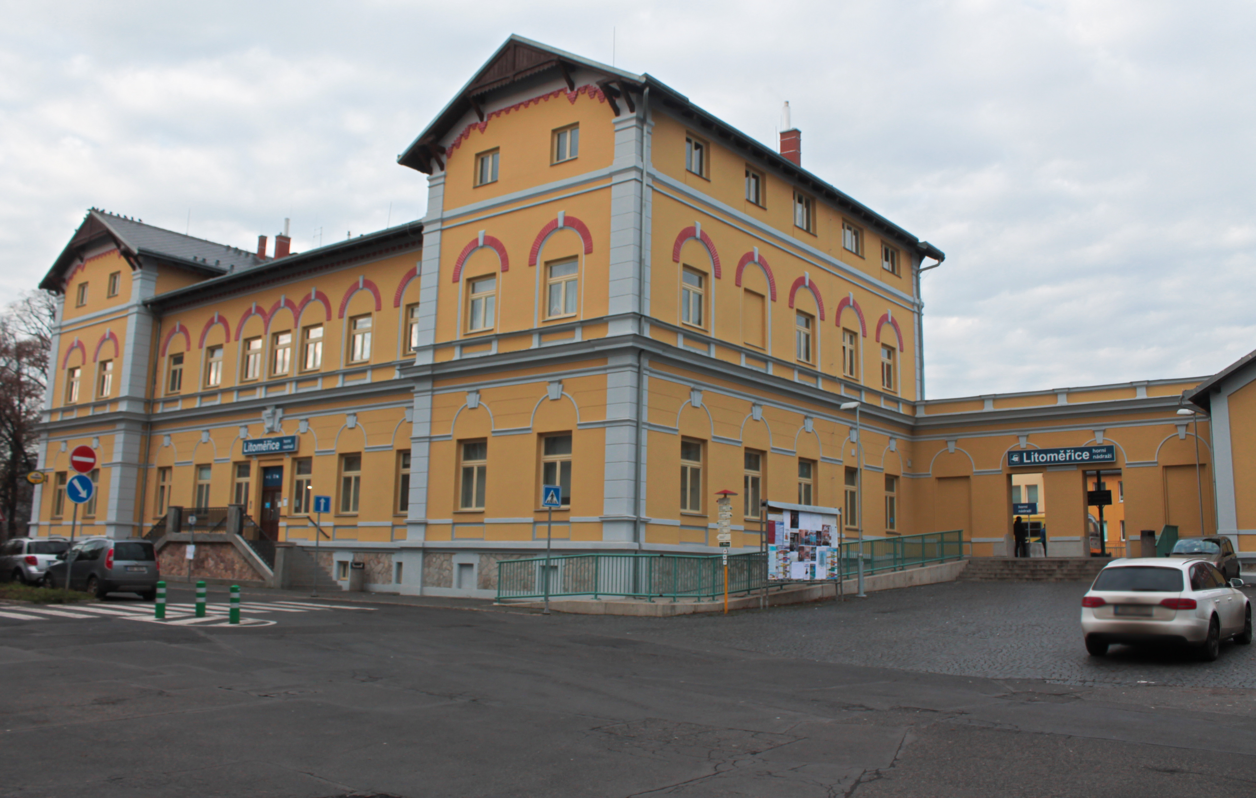 žst. Litoměřice horní nádraží, stav z konce roku 2019